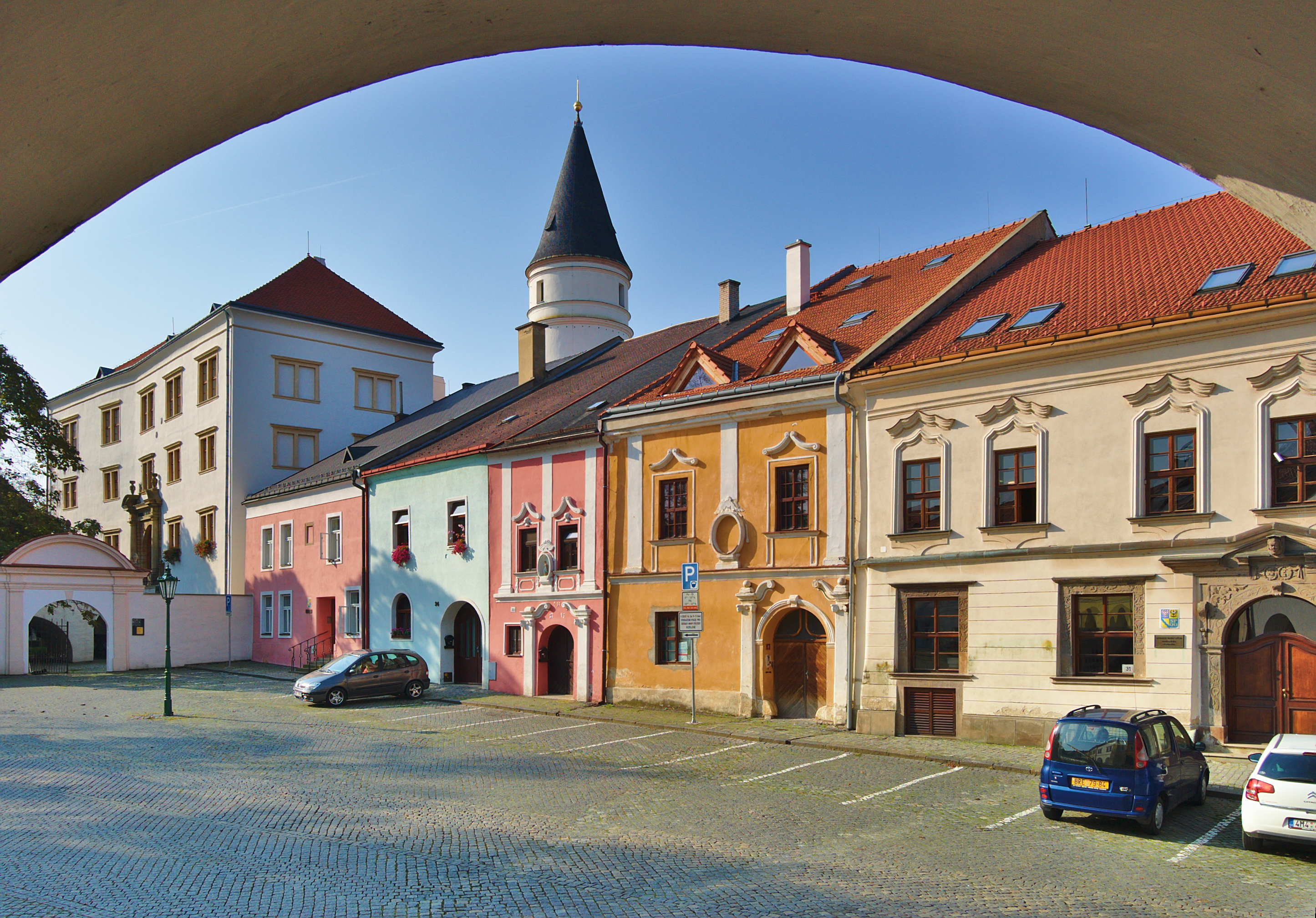 Zámek, Přerov